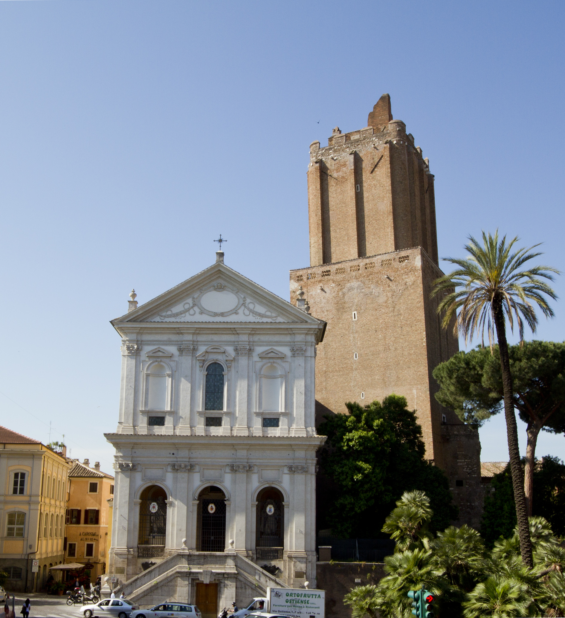 Santa Caterina a Magnanapoli with the Torre delle milizie behind